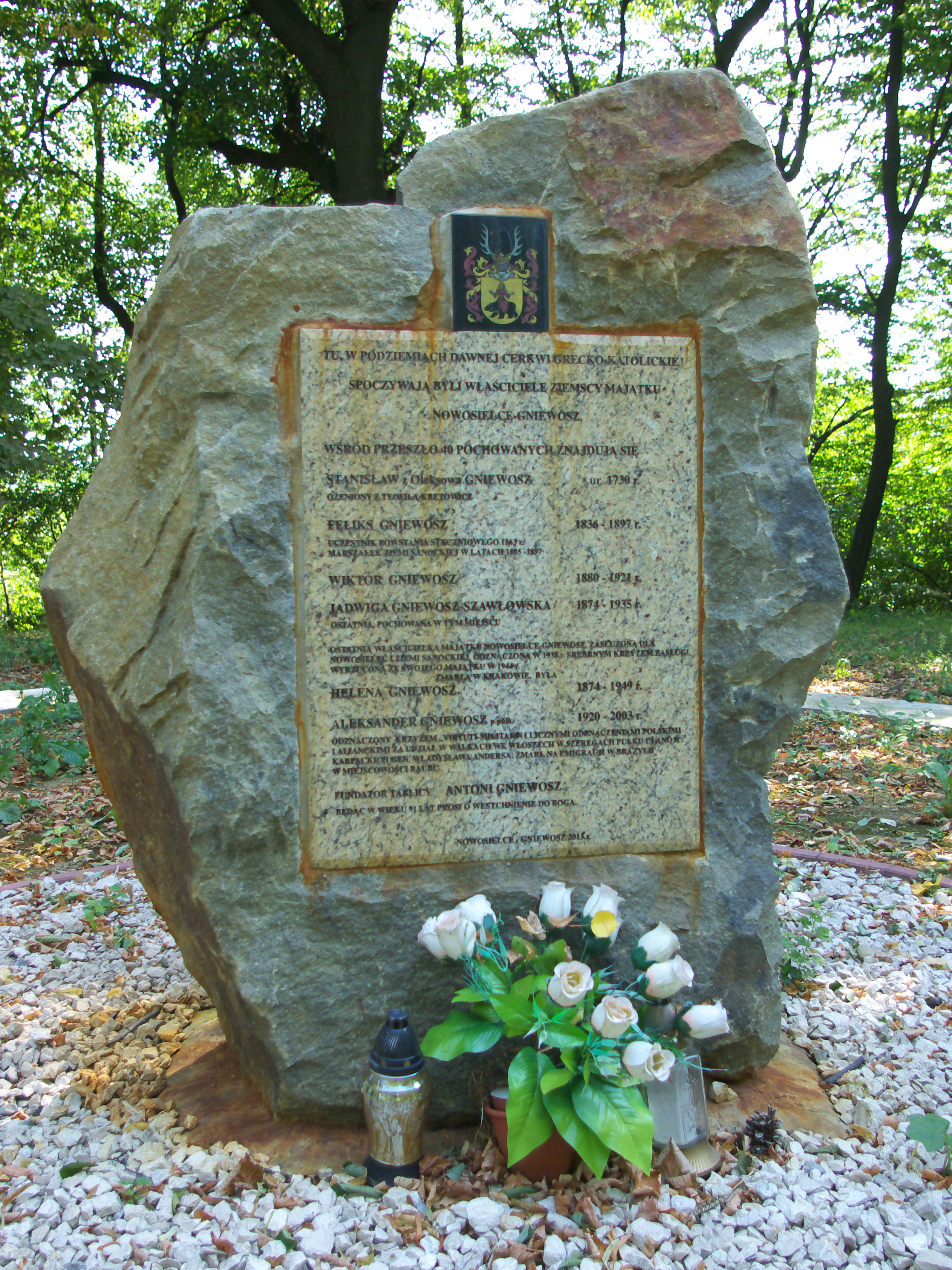 Kamień pamiątkowy upamiętniający członków rodziny Gniewoszów w Nowosielcach na miejscu istnienia dawnej cerkwi greckokatolickiej